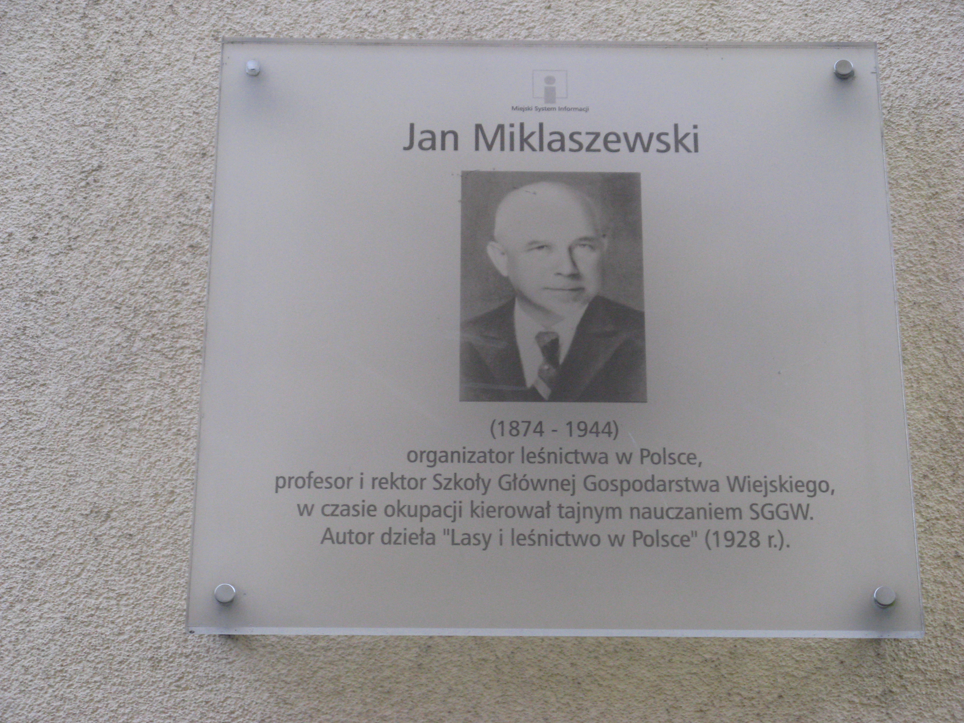 Tablica upamiętniająca Jana Mikalszewskiego